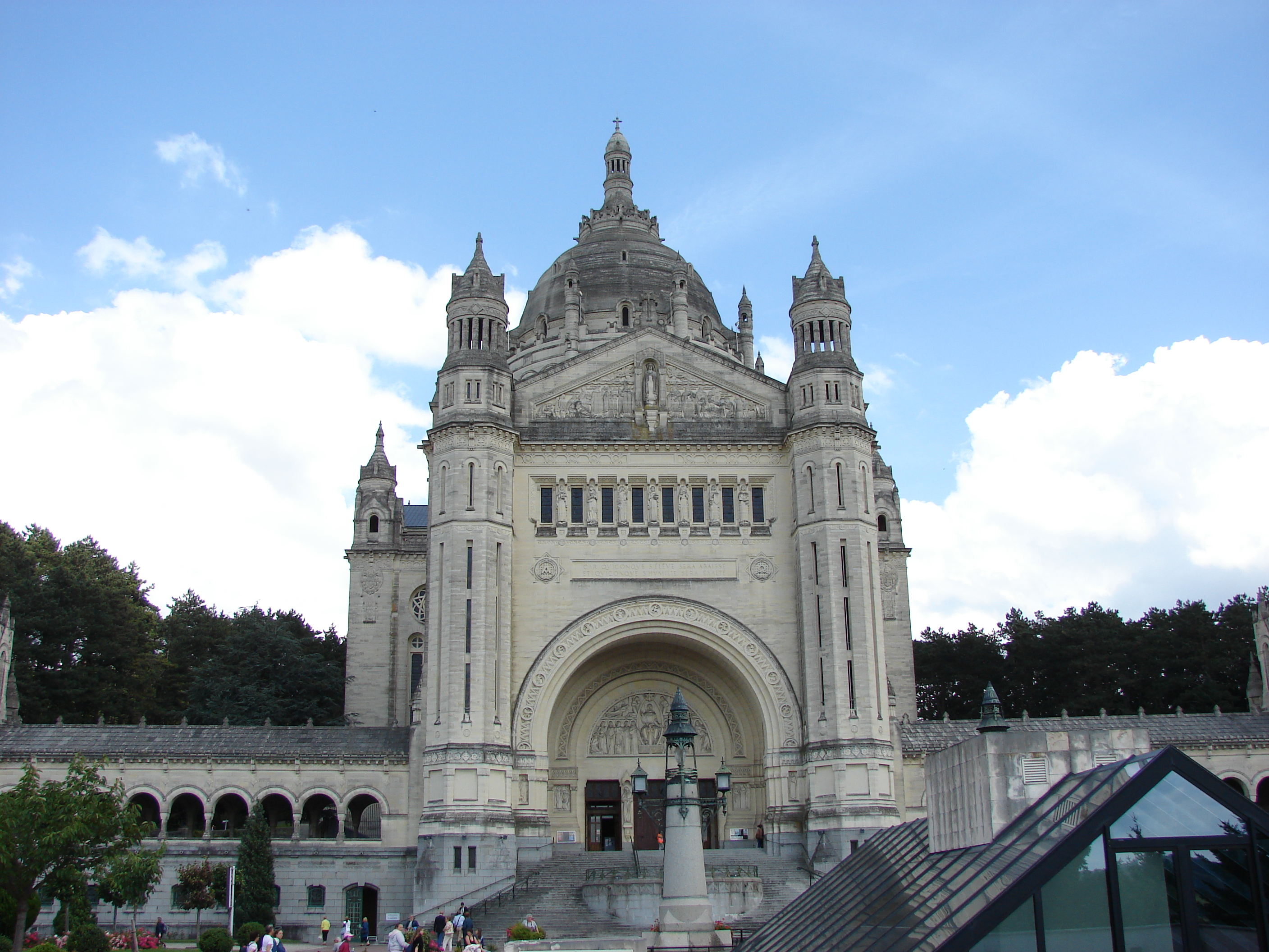 Basilique Sainte-Thérèse de Lisieux, Lisieux, Lower Normandy, France